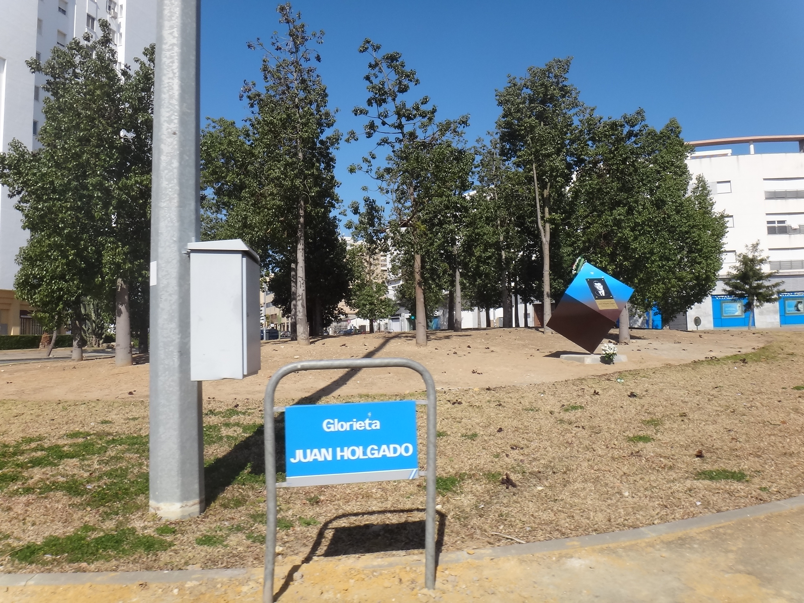 Glorieta con monumento a Juan Holgado